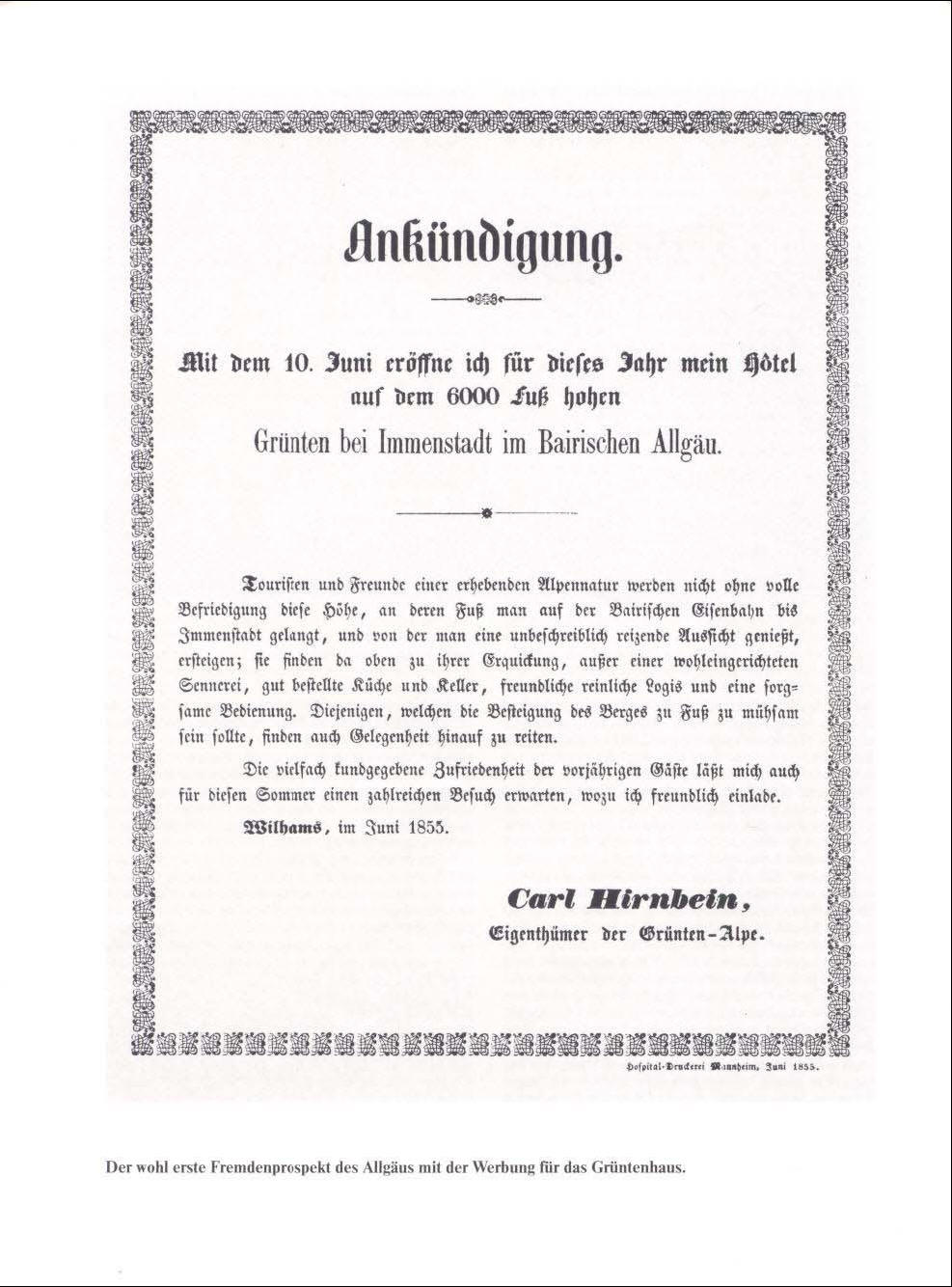 Ankündigung der Eröffnung des Grüntenhauses durch Carl Hirnbein